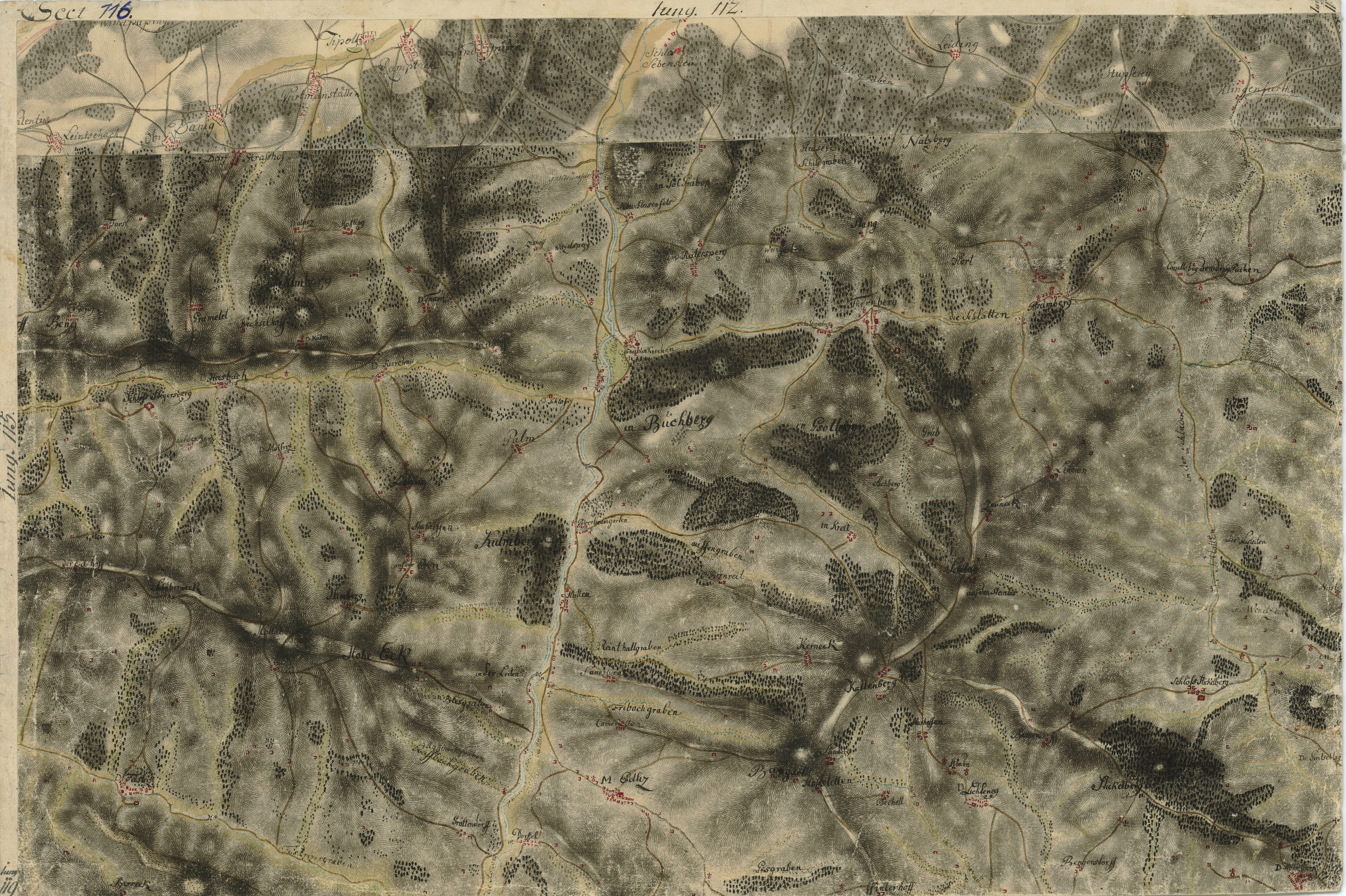 historische Landkarte BIXa242 sect.116 Josephinische Landesaufnahme: Aspang, Edlitz, Pittental, Niederösterreich, Österreich